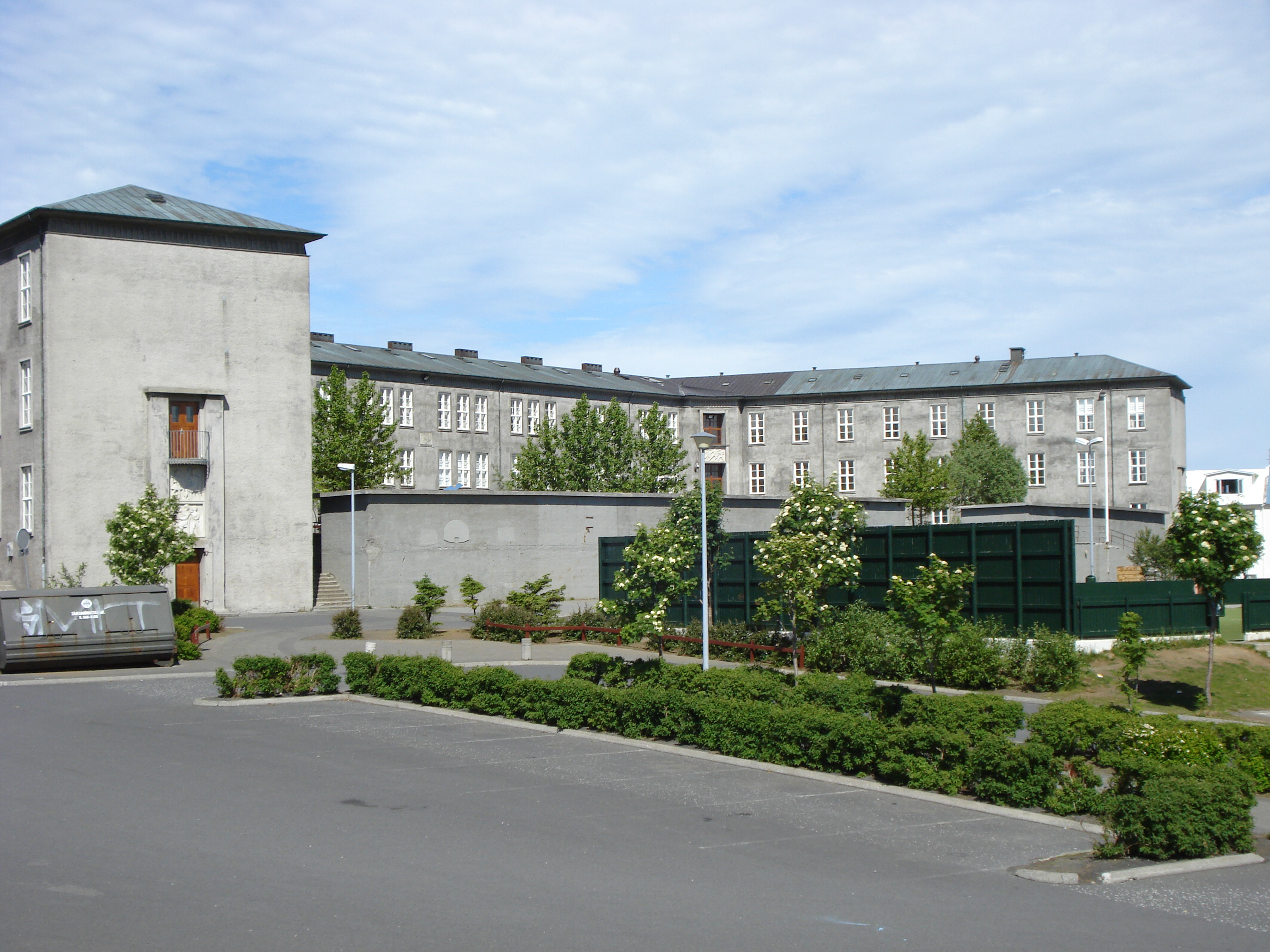 Primery School Reykjavik, Austurbaerjarskoli